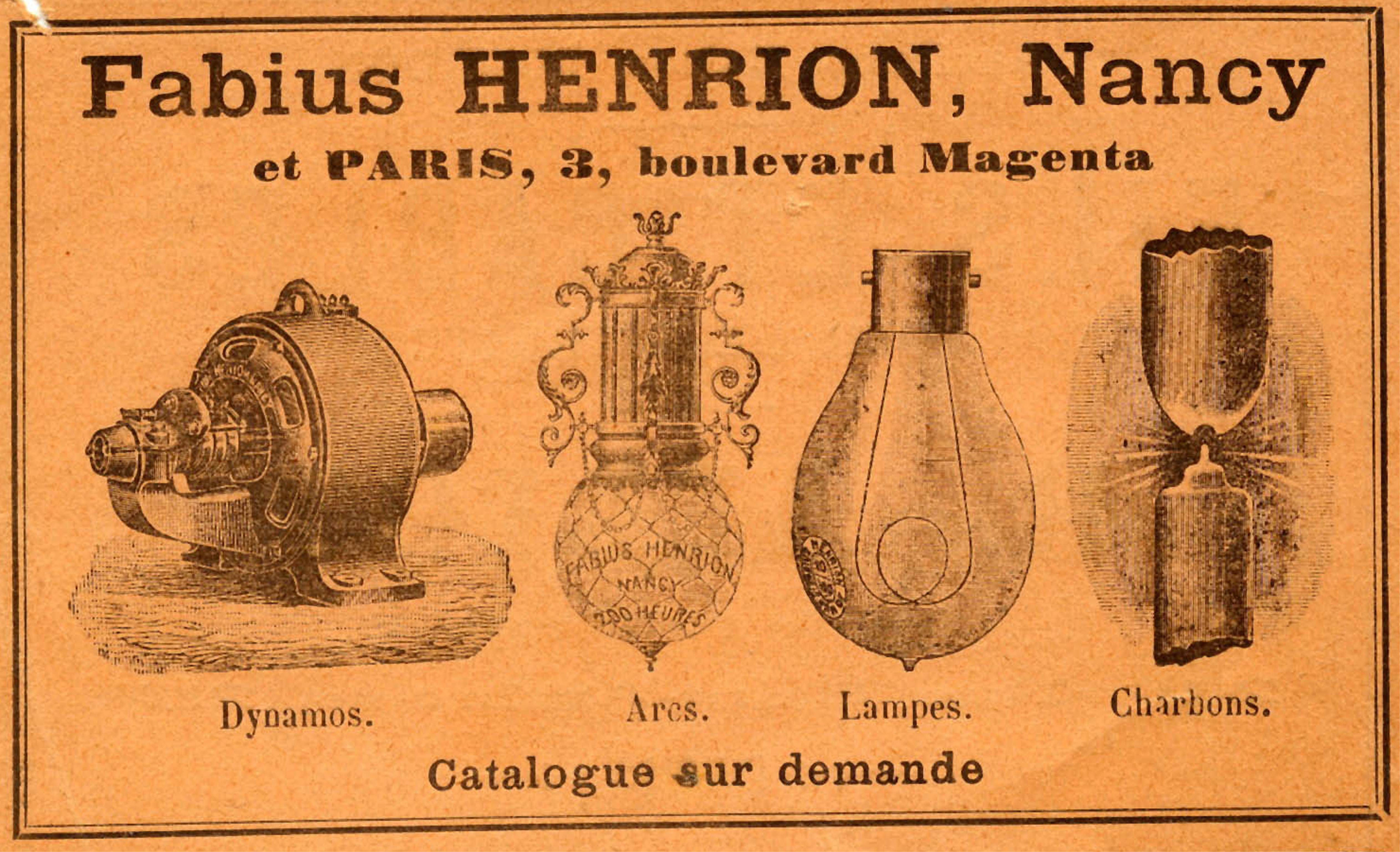 Publicité de l'entreprise Fabius Henrion Nancy, fabricant de matériel électrique.